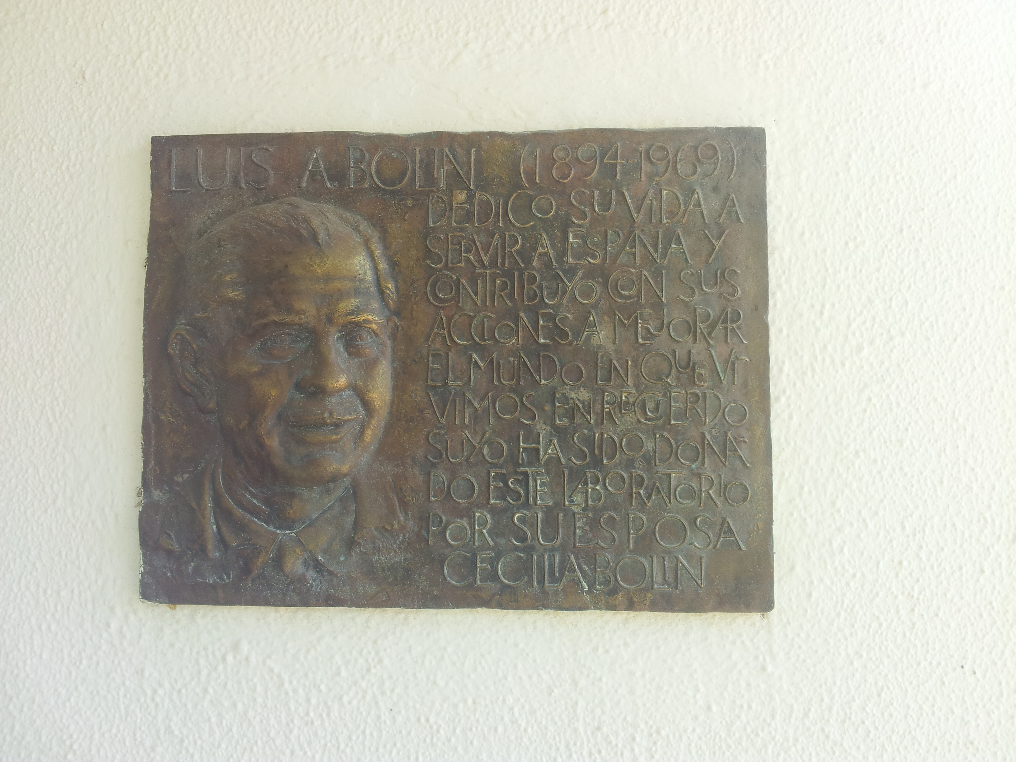 Placa de homenaje a Luis Antonio Bolín en el laboratorio del mismo nombre de la Reserva Biológica de Doñana.